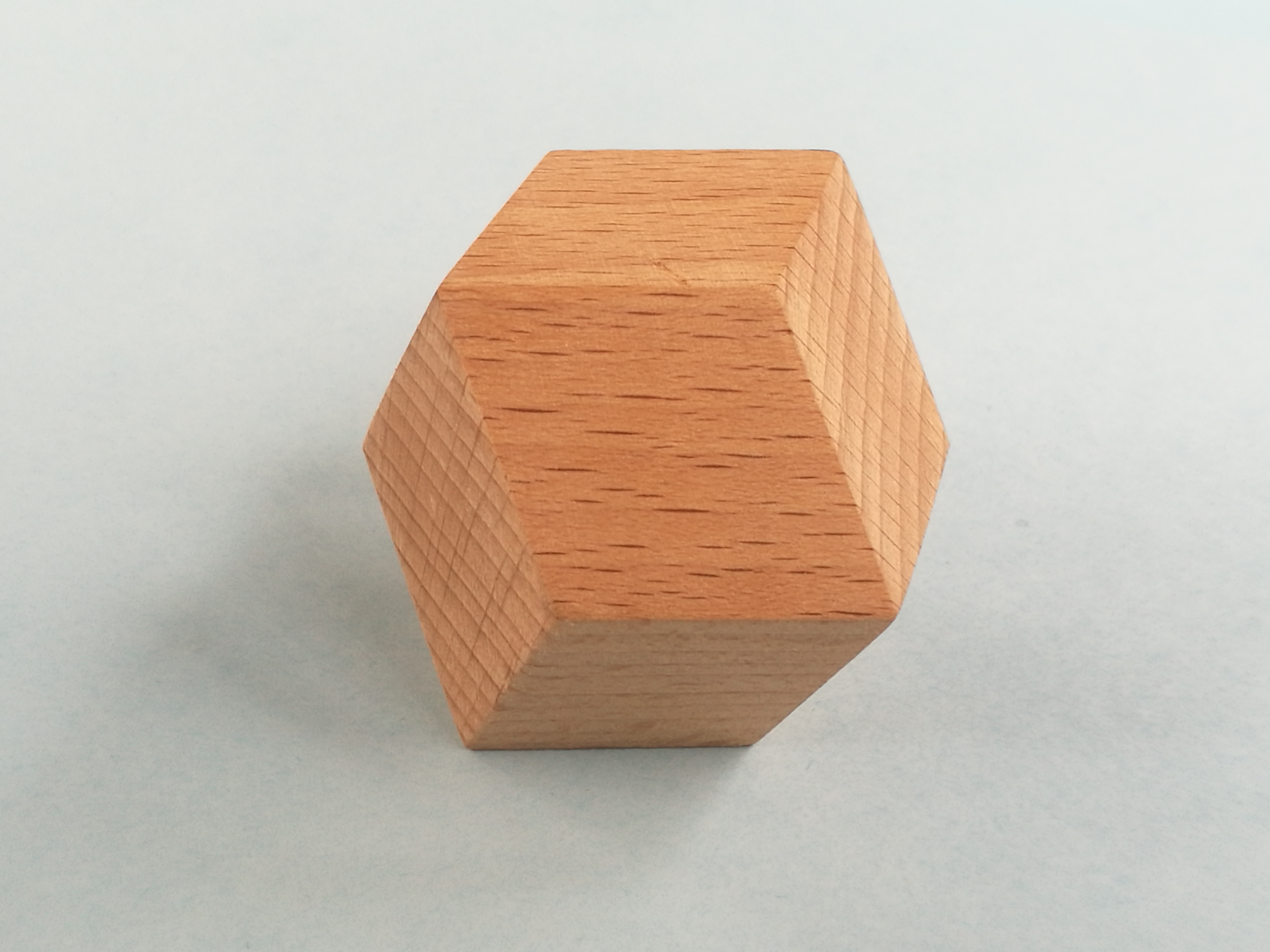 12 egybevágó rombusz által határolt test, mely a több síkban egymással szabadon elrendeződő gömbök összepréselődésekor is létrejöhet.